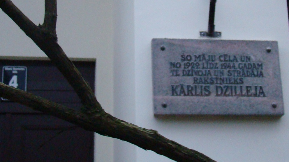 Piemiņas plāksne Kārlim Dziļlejai, Mazajā Nometņu ielā 4